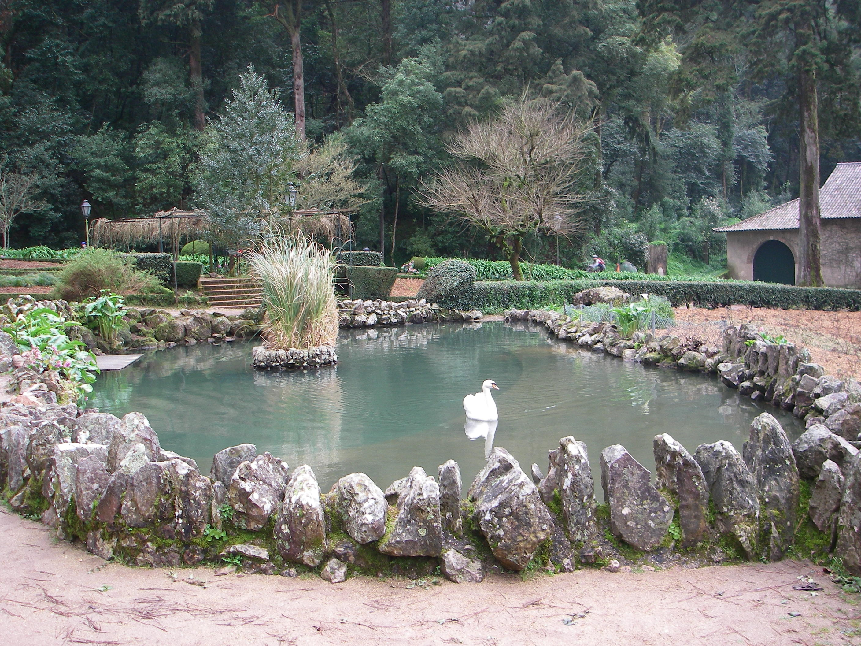 Palácio Hotel de Bussaco, Palacete Hotel do Buçaco ou Palace Hotel do Buçaco e mata envolvente, incluindo as capelas e ermidas, Cruz Alta em conjunto com o Convento de Santa Cruz do Buçaco This file was uploaded for Wiki Loves Monuments in Portugal with the unique identifier 74851.